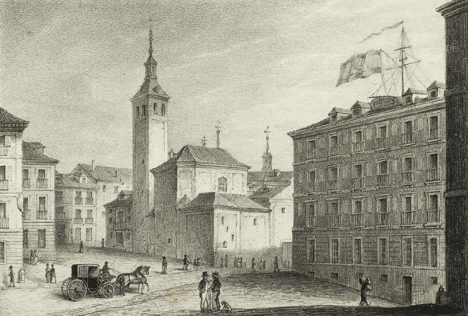 Vista de la antigua iglesia de Santa María de la Almudena y del primitivo Museo Naval (Madrid, España). Litografía del Museo Nacional de Romanticismo (Madrid).